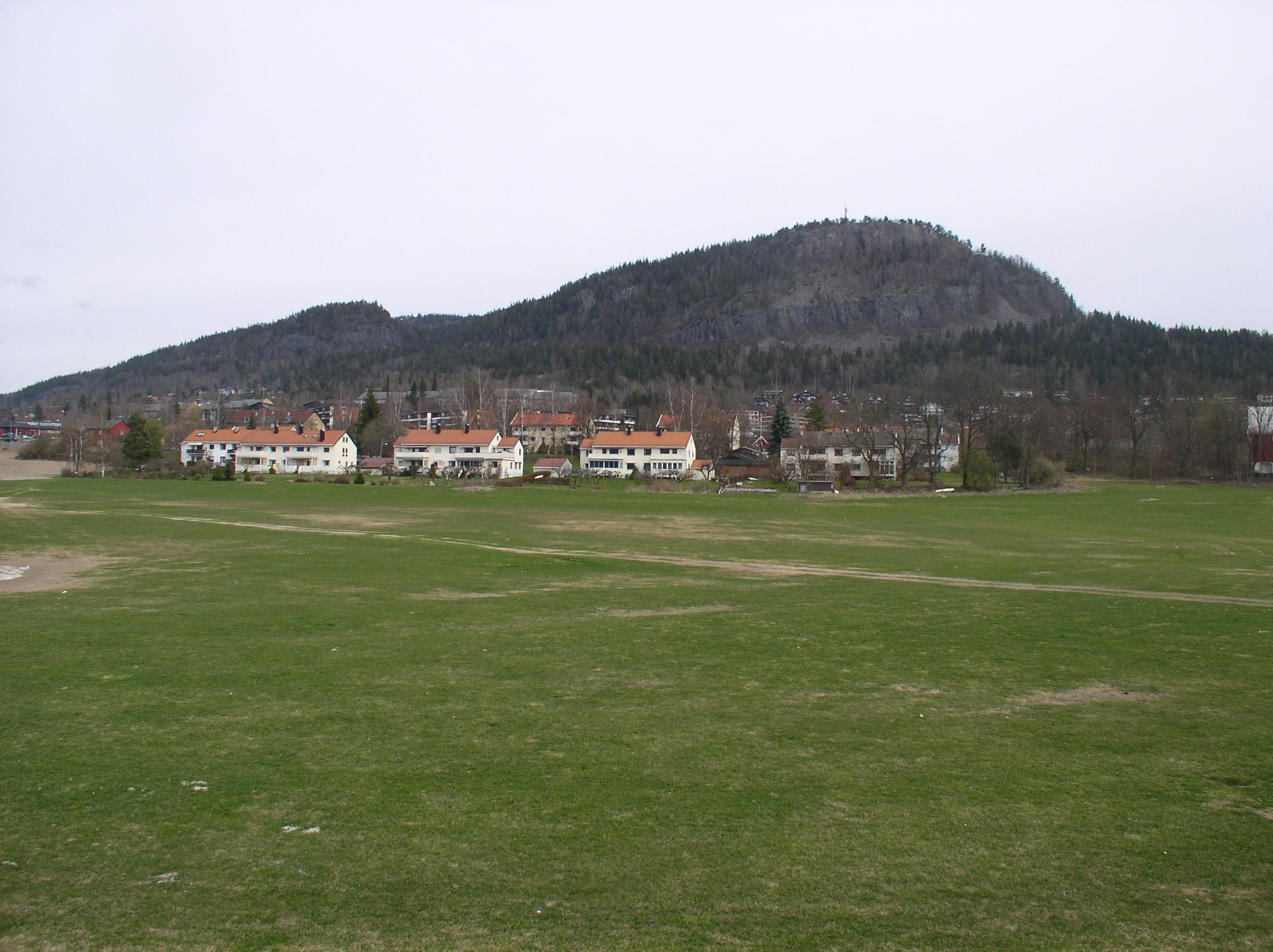 Kolsåstoppene Nord til venstre og Syd til høyre, sett fra Rudsletta ved Plantasjen. Bergartene ble avsatt av en lavastrøm fra nord sent i riftstadiet i permtiden.